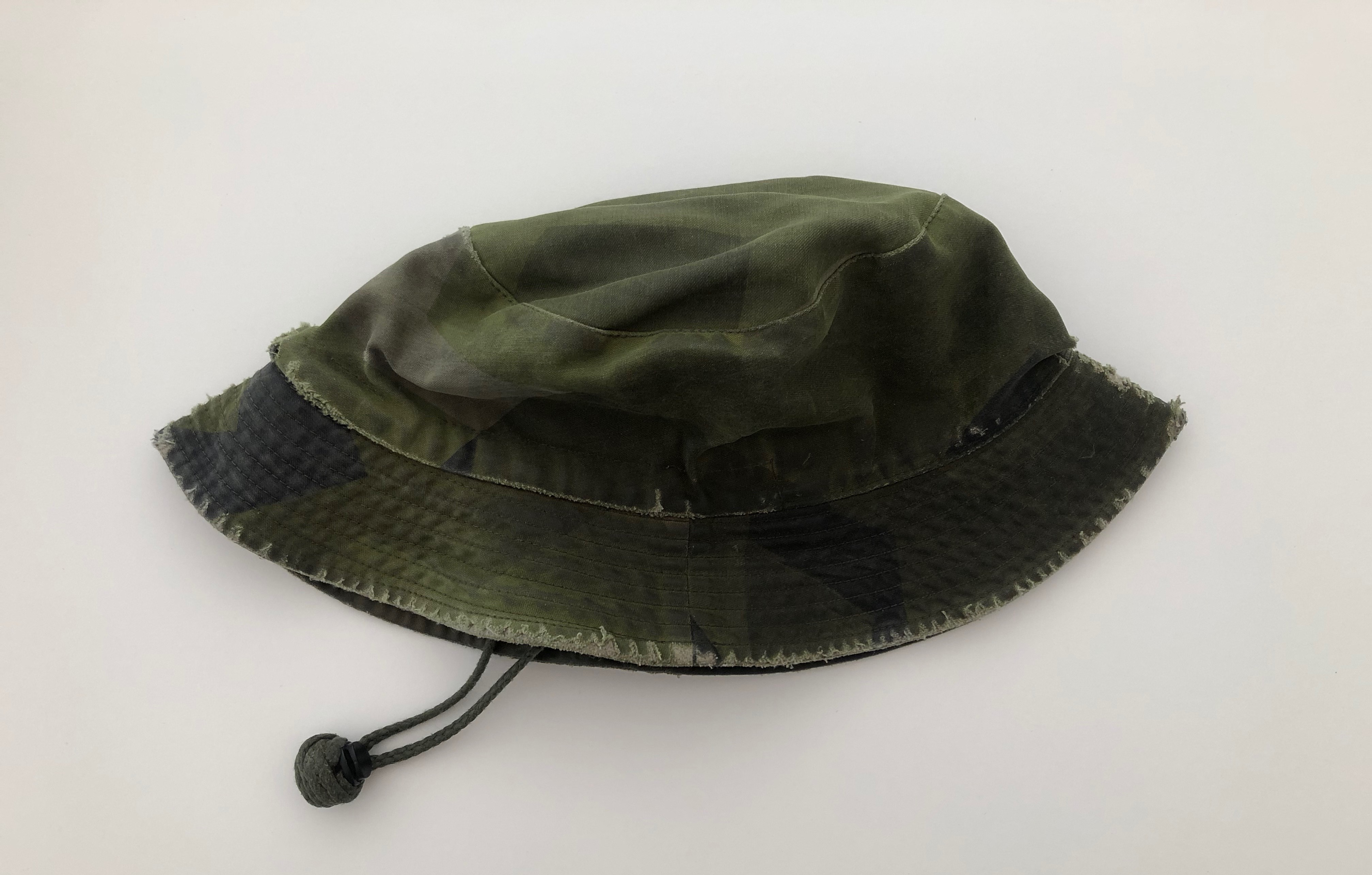 Bassäkhatt